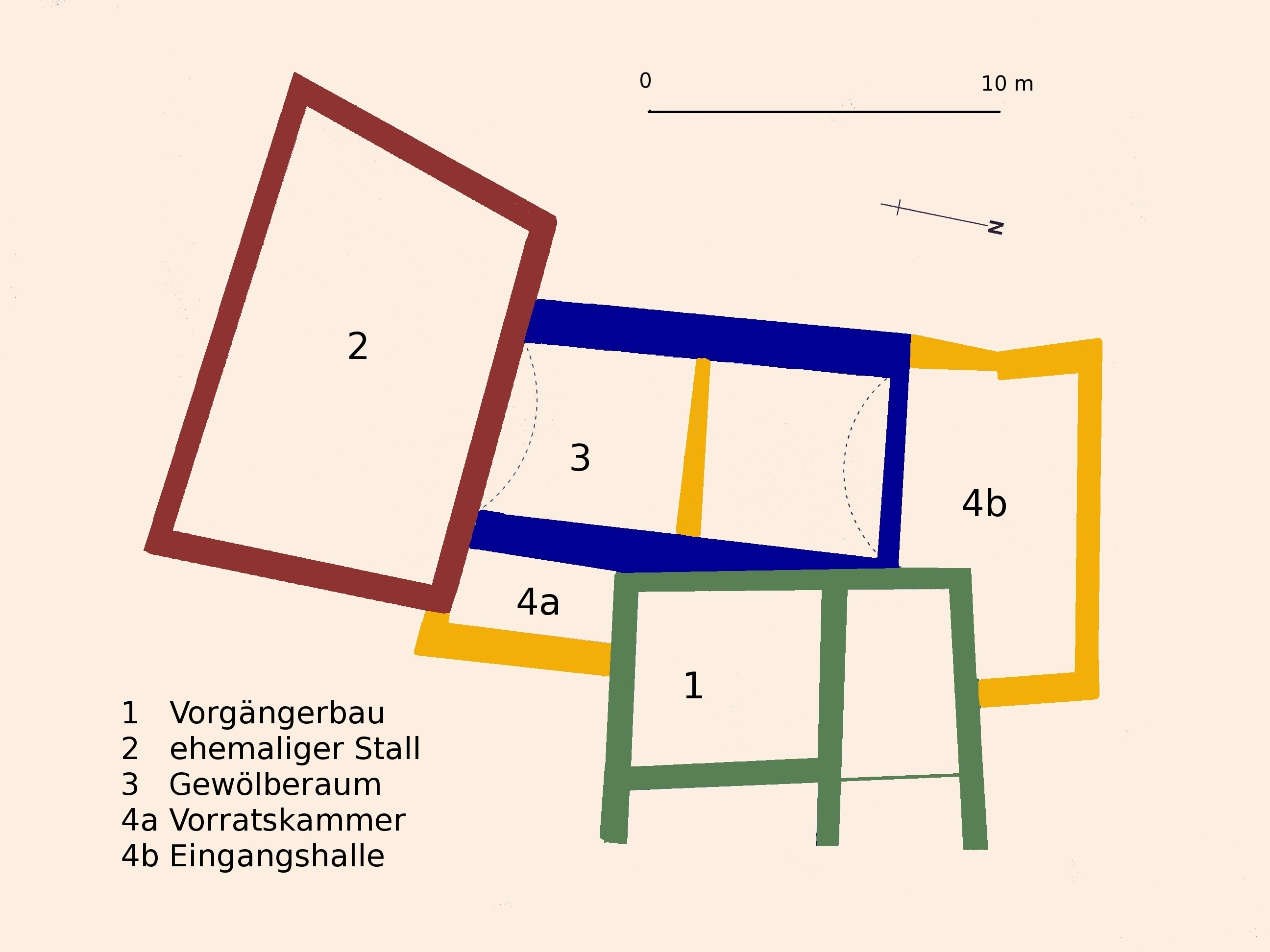 Hotel Weiss Kreuz, Plan der Bauphasem